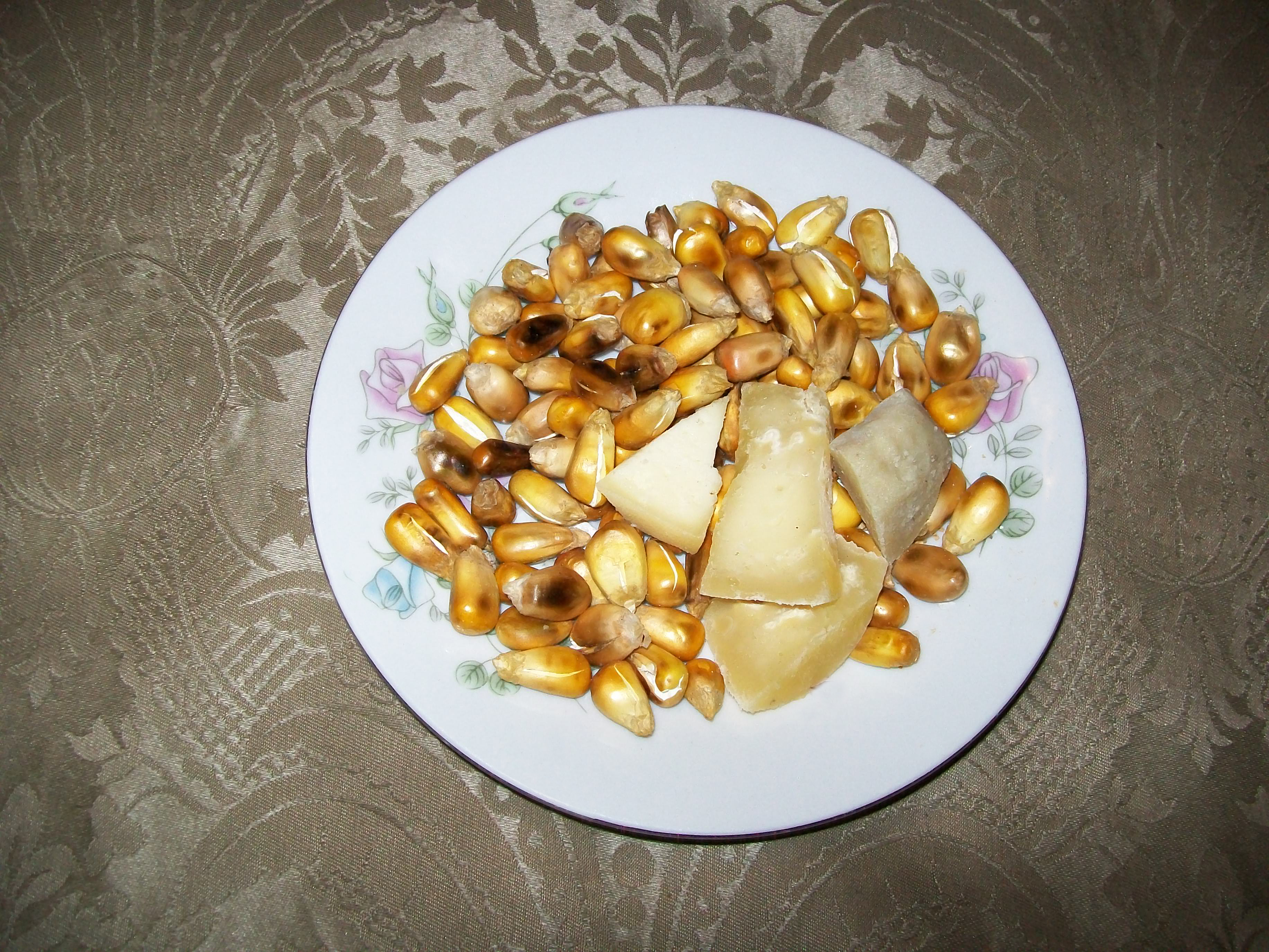 Gastronomía Ocrosina. Nombre:Cancha Tostada de Ocros. País:Perú Fotógrafo:© Edgar Amador Espinoza Montesinos